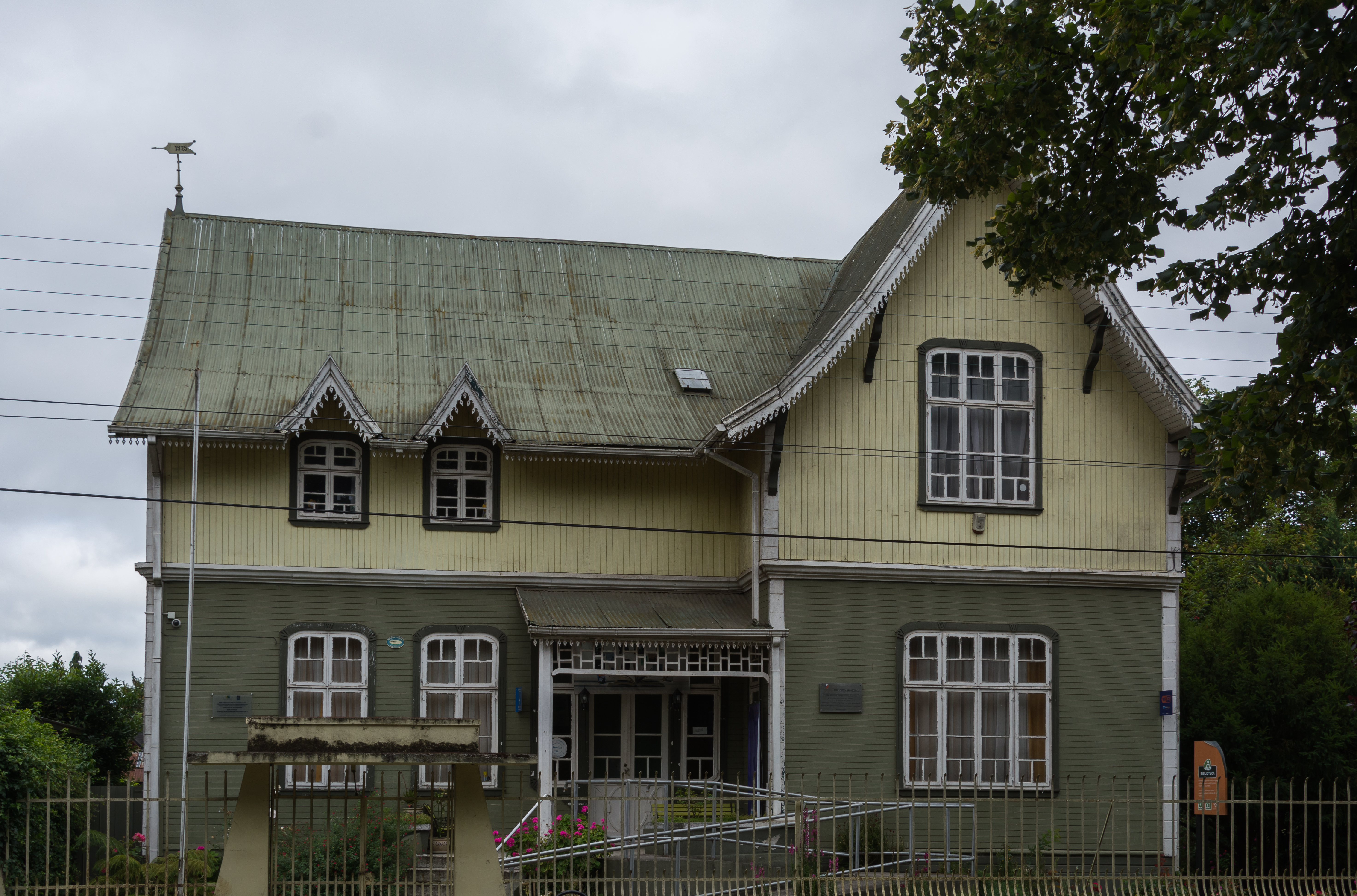 Casa Peters, Río Bueno, Región de Los Ríos, Chile.